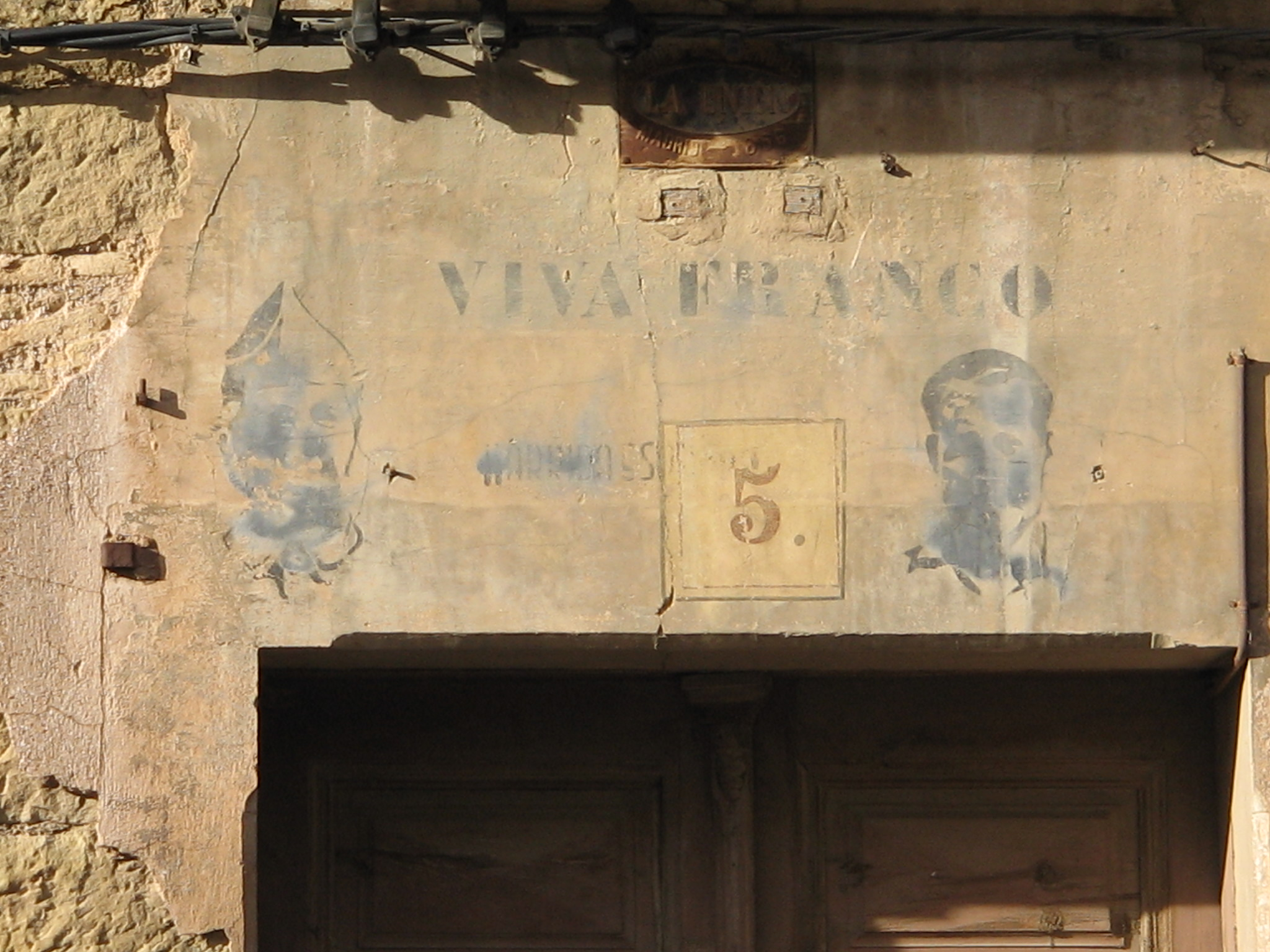 Pintada en el dosel de la puerta de la casa del jardín de Pie en Ayerbe. Esta casa sirvió de cuartel general al general G.Urrutia, de la 51 división de Aragón, durante parte de la guerra civil española